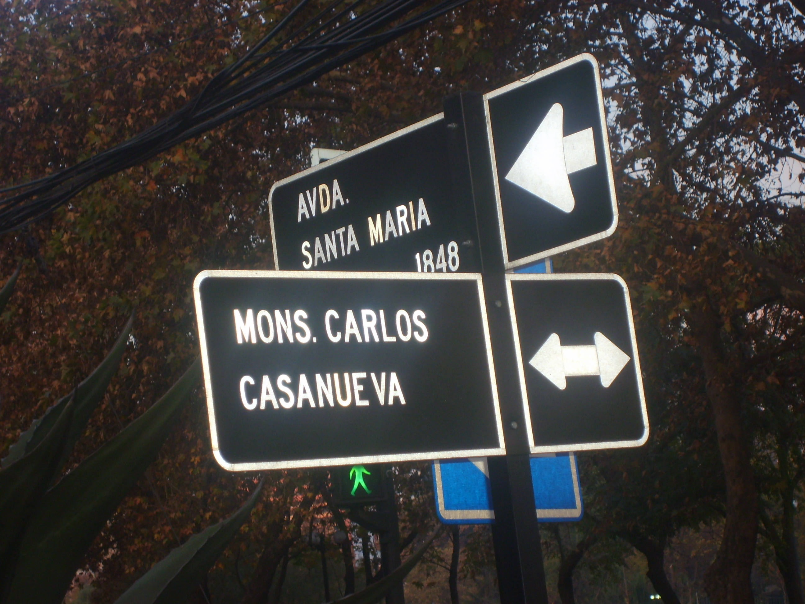 Fotografía digital